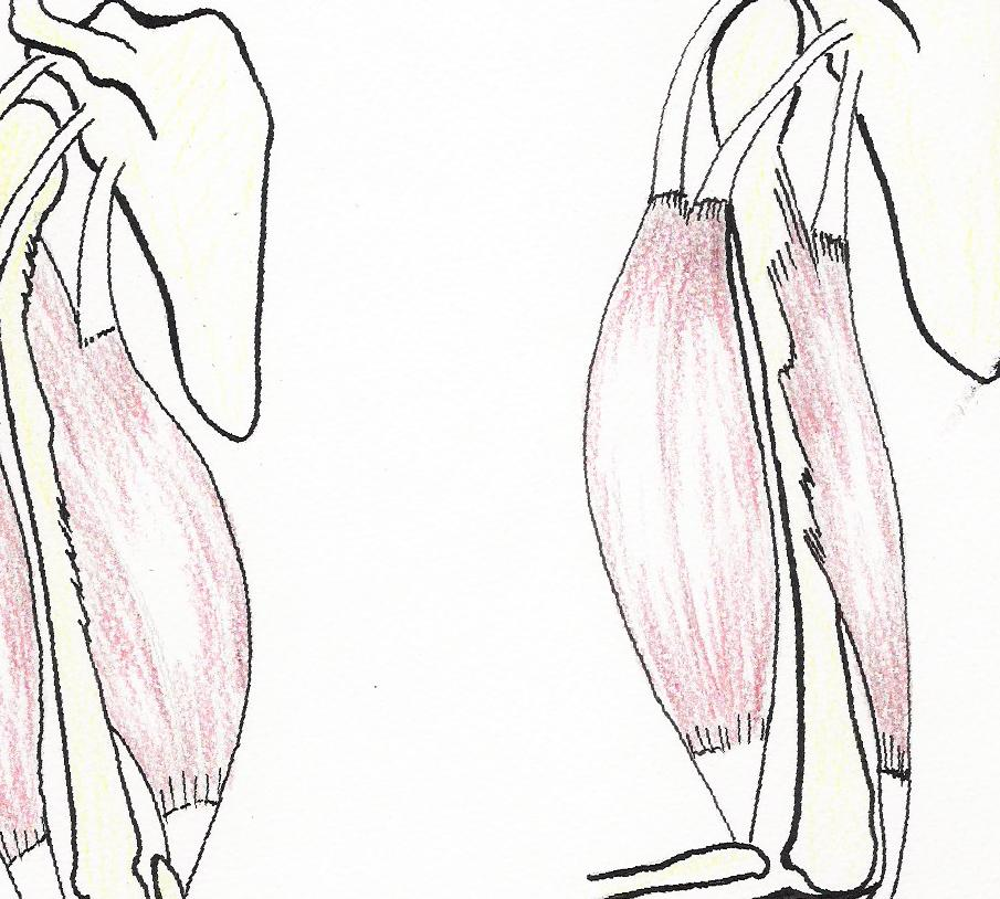 Yoga postures